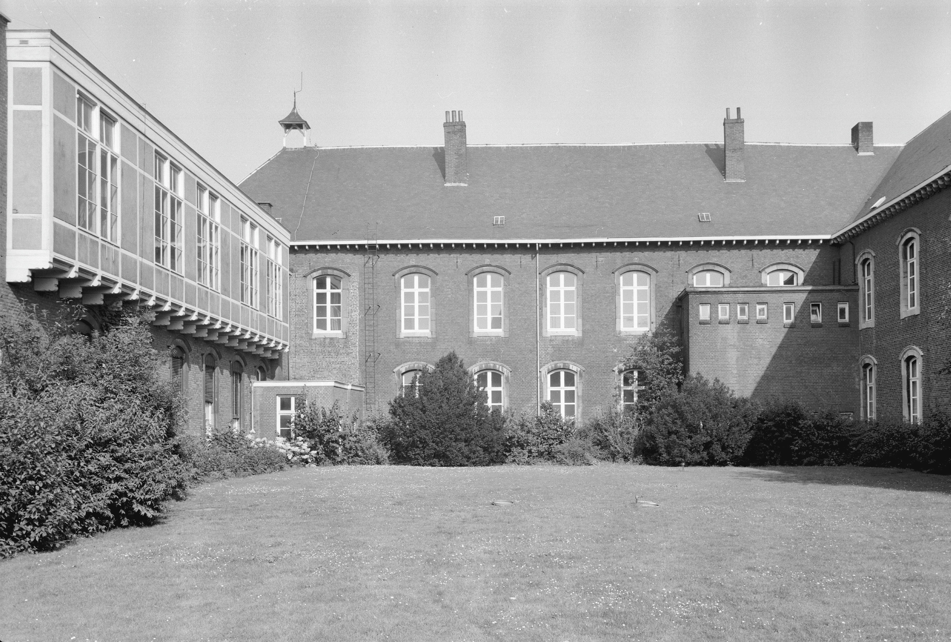 binnentuin H.B.S.